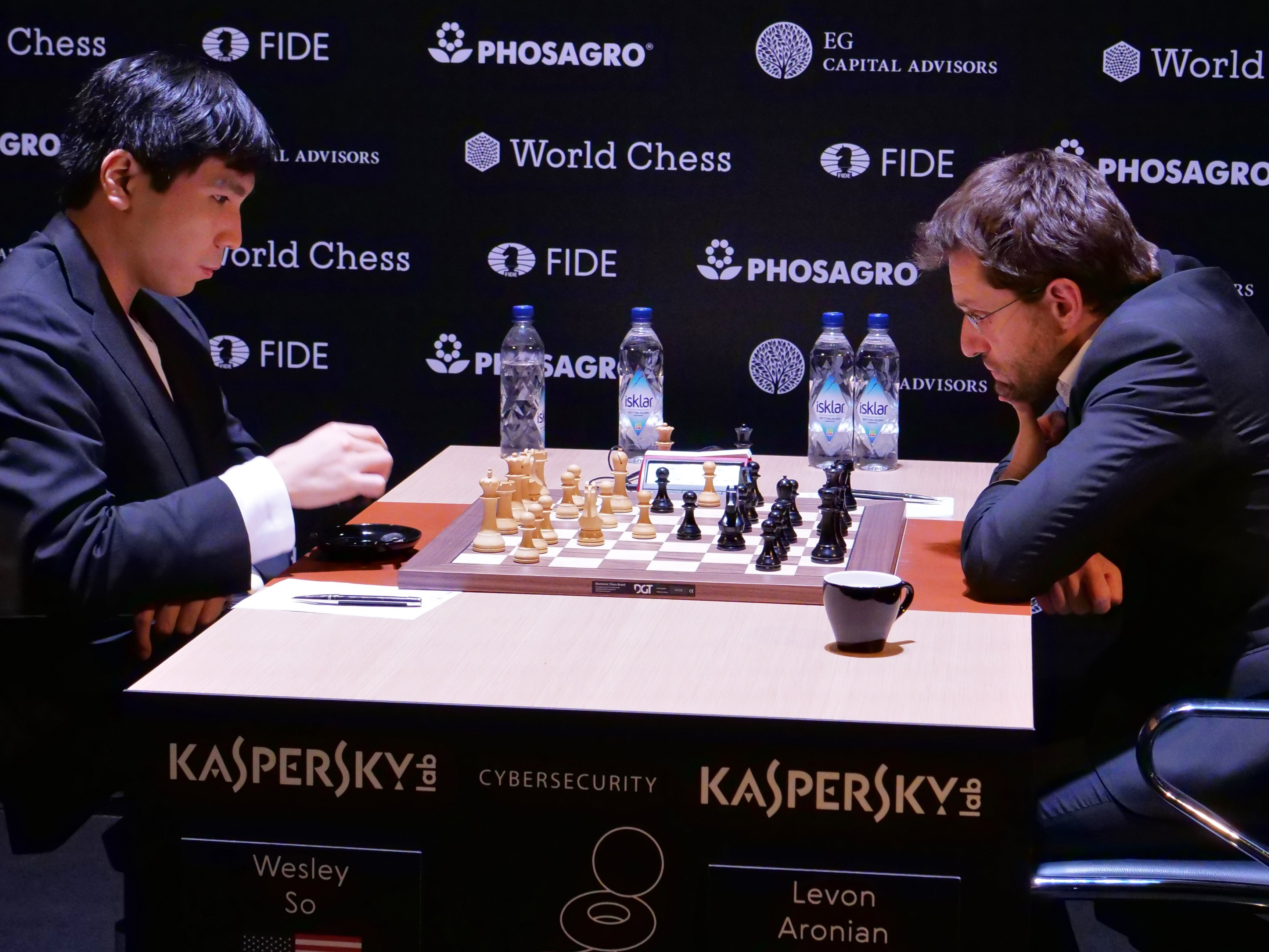 Wesley So und Lewon Aronjan, Kandidatenturnier Berlin 2018, 6. Runde